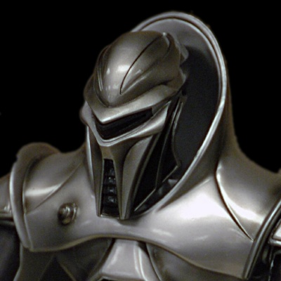 Image sous licence cc-by-2.0 modifiée